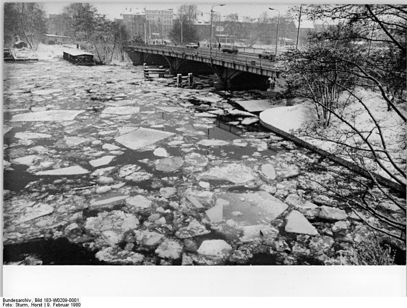 Berlin, Köpenick, Schloßbrücke, Winter ADN-ZB Sturm 9.2.80 Berlin: Dieser Blick bietet sich dem Besucher des Köpenicker Schlosses zur Zeit. Unmittelbar am Schloß fließt die Dahme, im Hintergrund sieht man die Schloßbrücke. Anmerkung: Der Bildurheber bezeichnet die Brücke als Schloßbrücke. Allgemein und offiziell wird sie jedoch Lange Brücke Köpenick genannt. -- Biberbaer (talk) 12:41, 15 October 2009 (UTC)